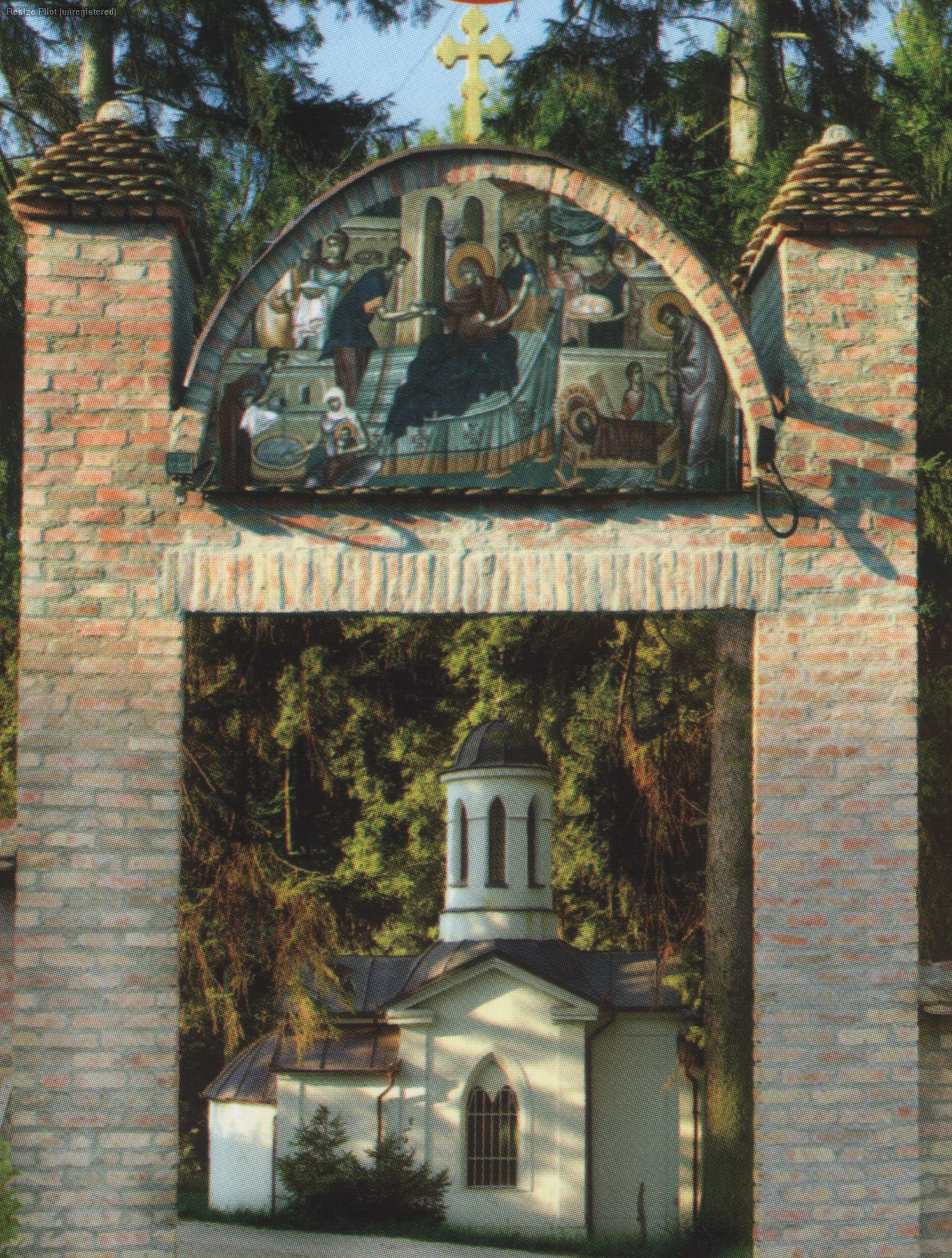 капија манастира